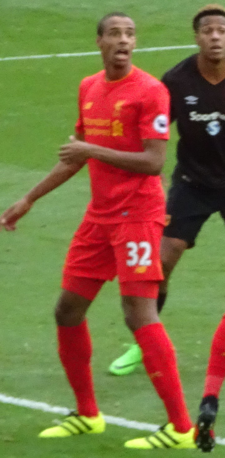 Headers